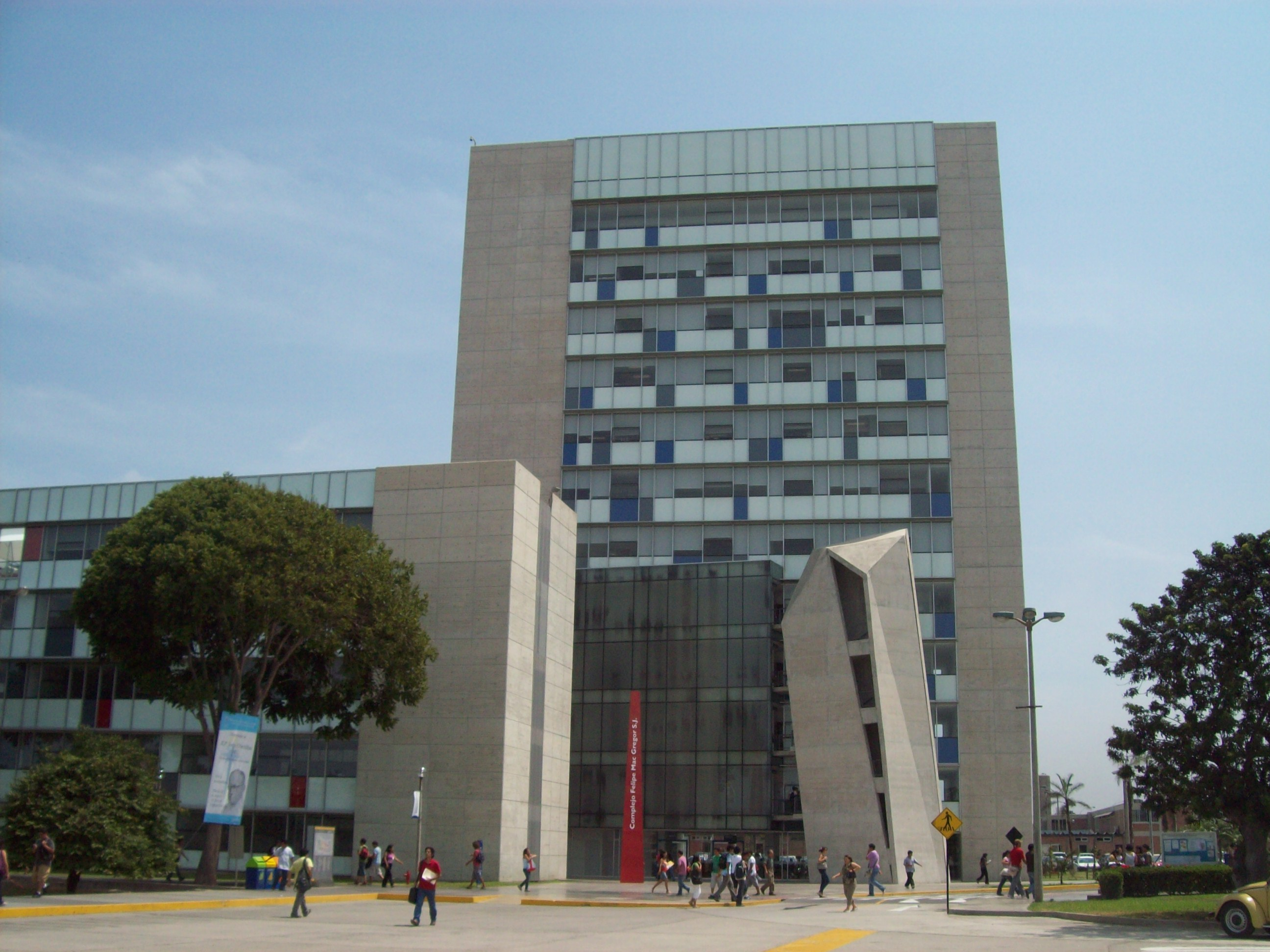 Complejo arquitectónico R.P. Felipe MacGregor en la Pontificia Universidad Católica del Perú distrito.